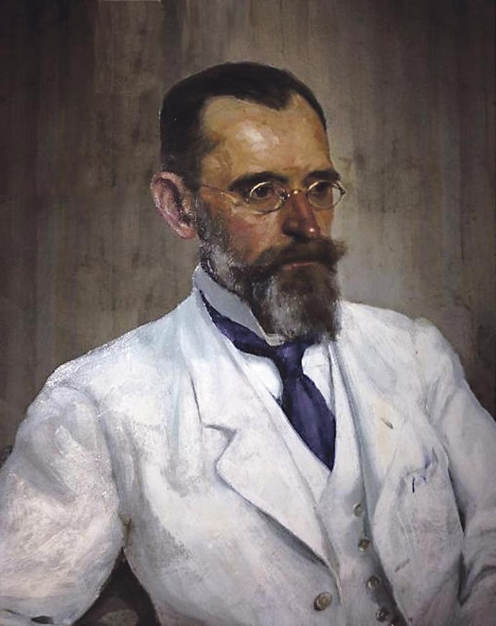 Árpád_Mühle (1870-1930), Portraet des Malers Adalbert Varga.